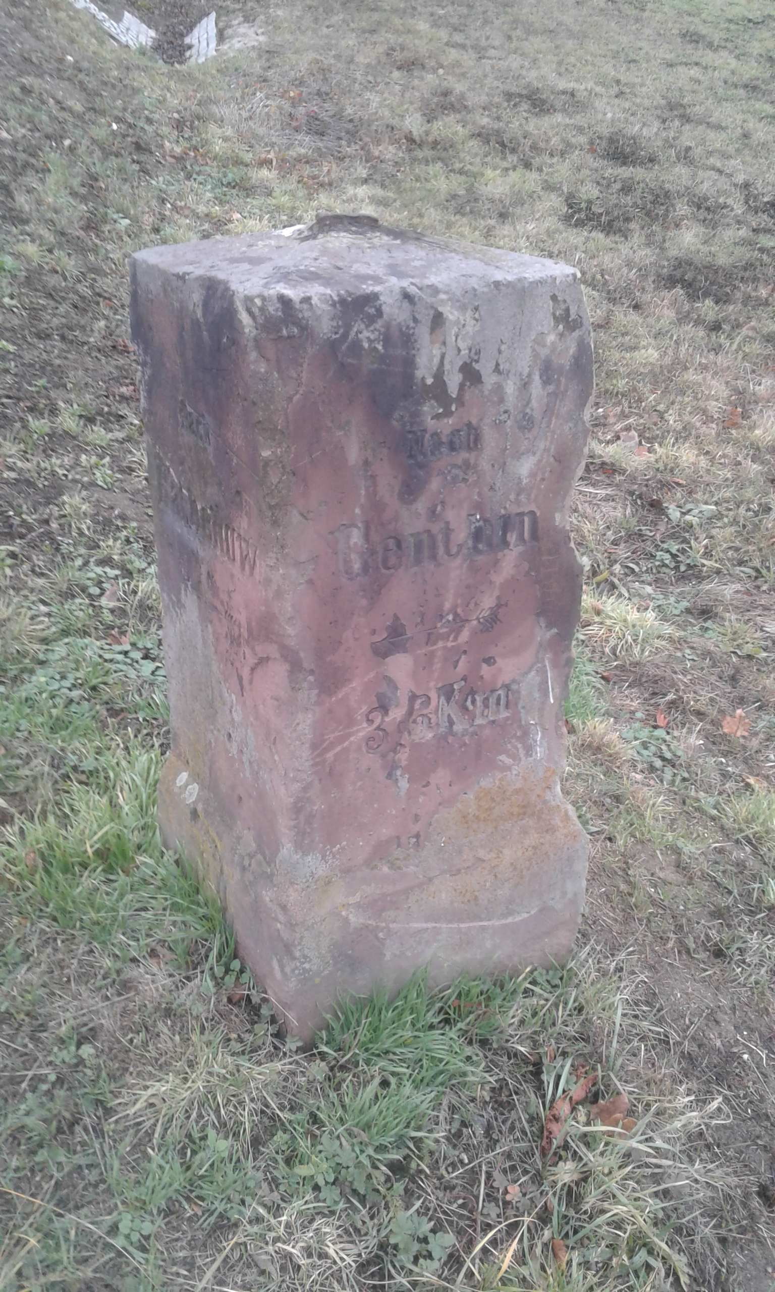 Meilenstein